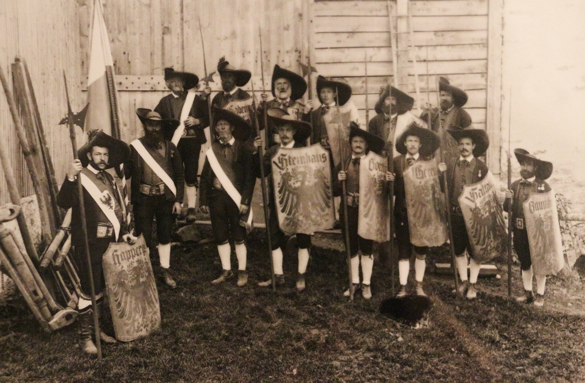 Schildherren (Datum unbekannt). Die Schilder und Hellebarden wurden für die Jahrhunderfeier 1908/1909 gefertigt, sie haben keine historischen Vorbilder